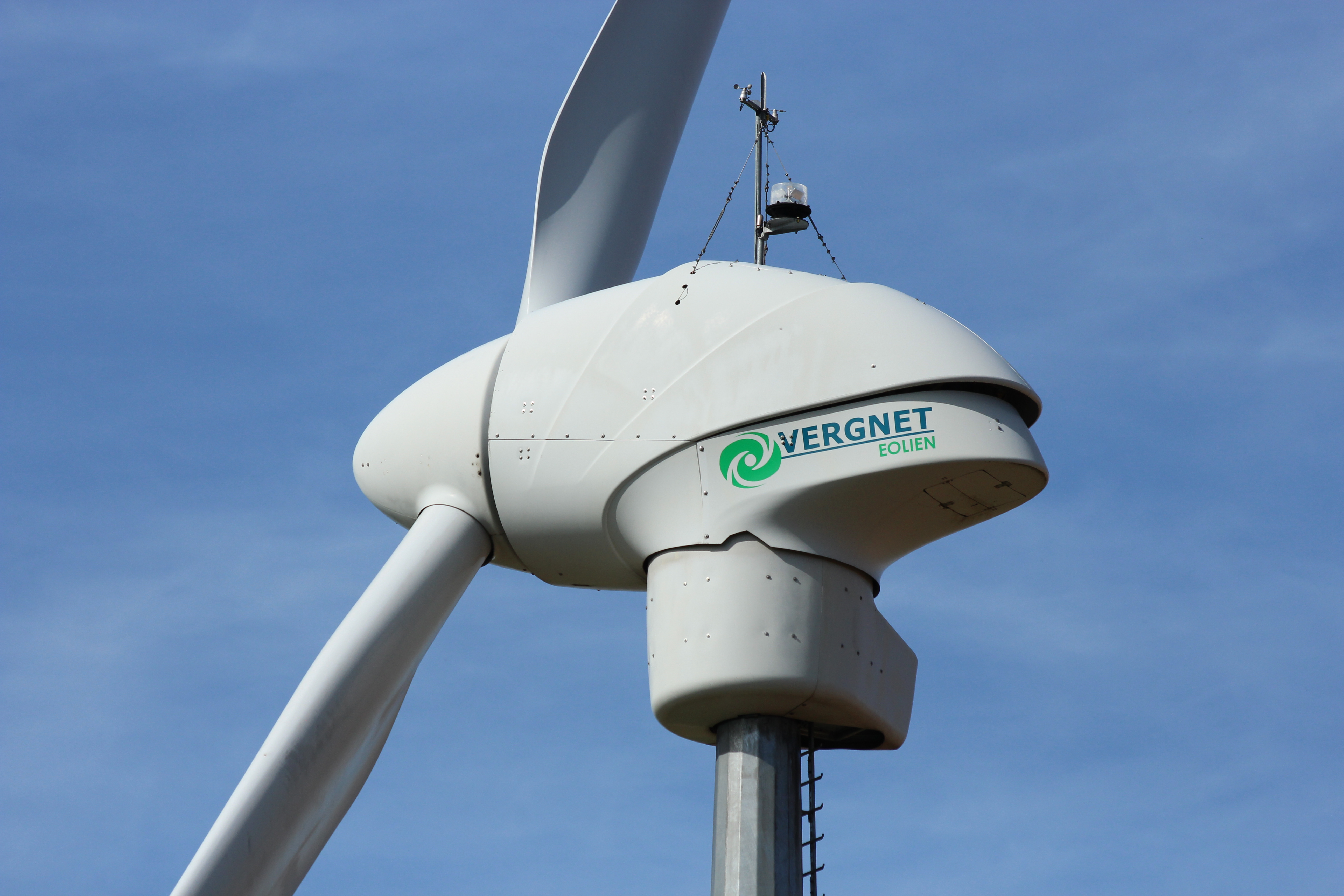 Éolienne Vergnet à Gommerville Object location48° 20′ 00.96″ N, 1° 56′ 47.41″ E